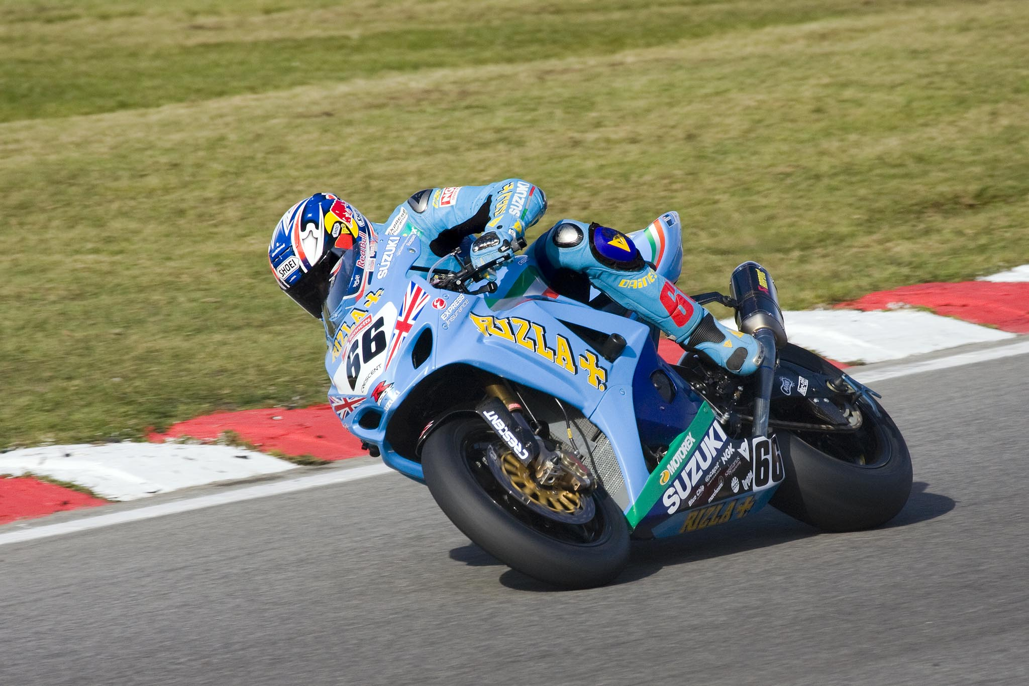 foto Tom Sykes